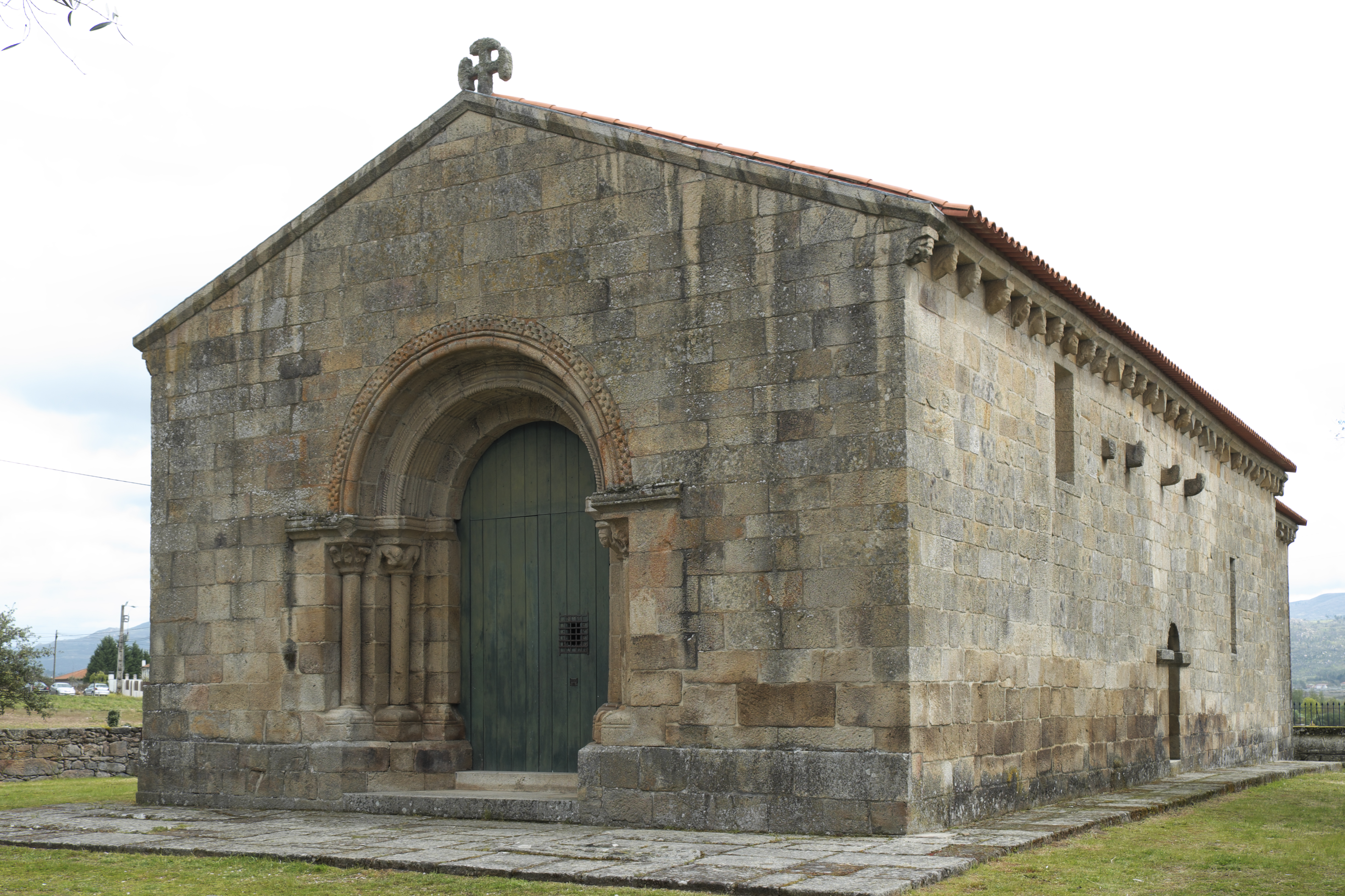 Romanische Kirche Nossa Senhora da Azinheira in Outeiro Seco, einer Freguesia von Chaves in der Região Norte (Portugal)